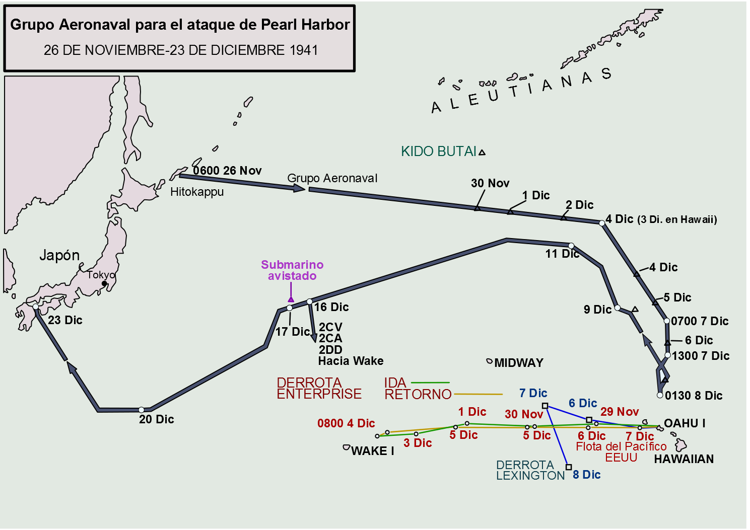 Plano vectorizado del ataque a Pearl Harbor en 1941 a partir de un plano original del Gobierno Federal de los Estados Unidos de dominio público.